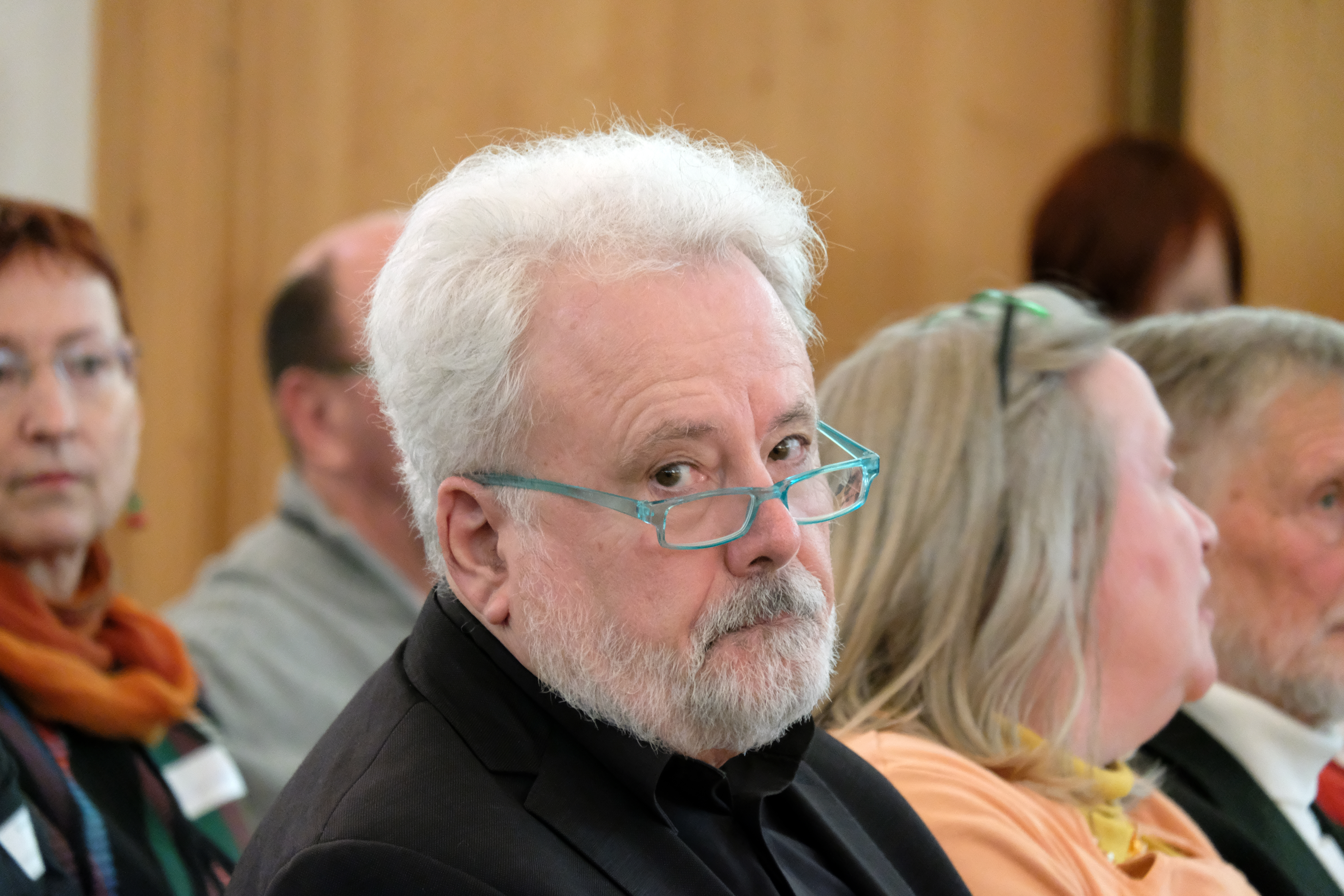 Klaus-Peter Murawski in Nürnberg, Nov. 2019